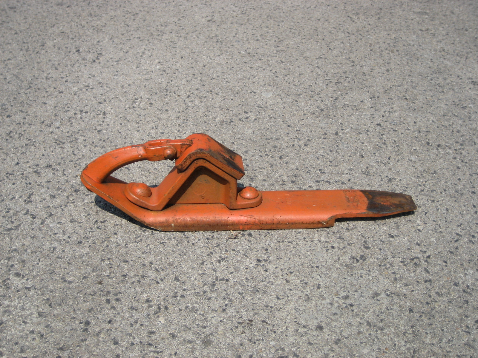 Hemmschuh